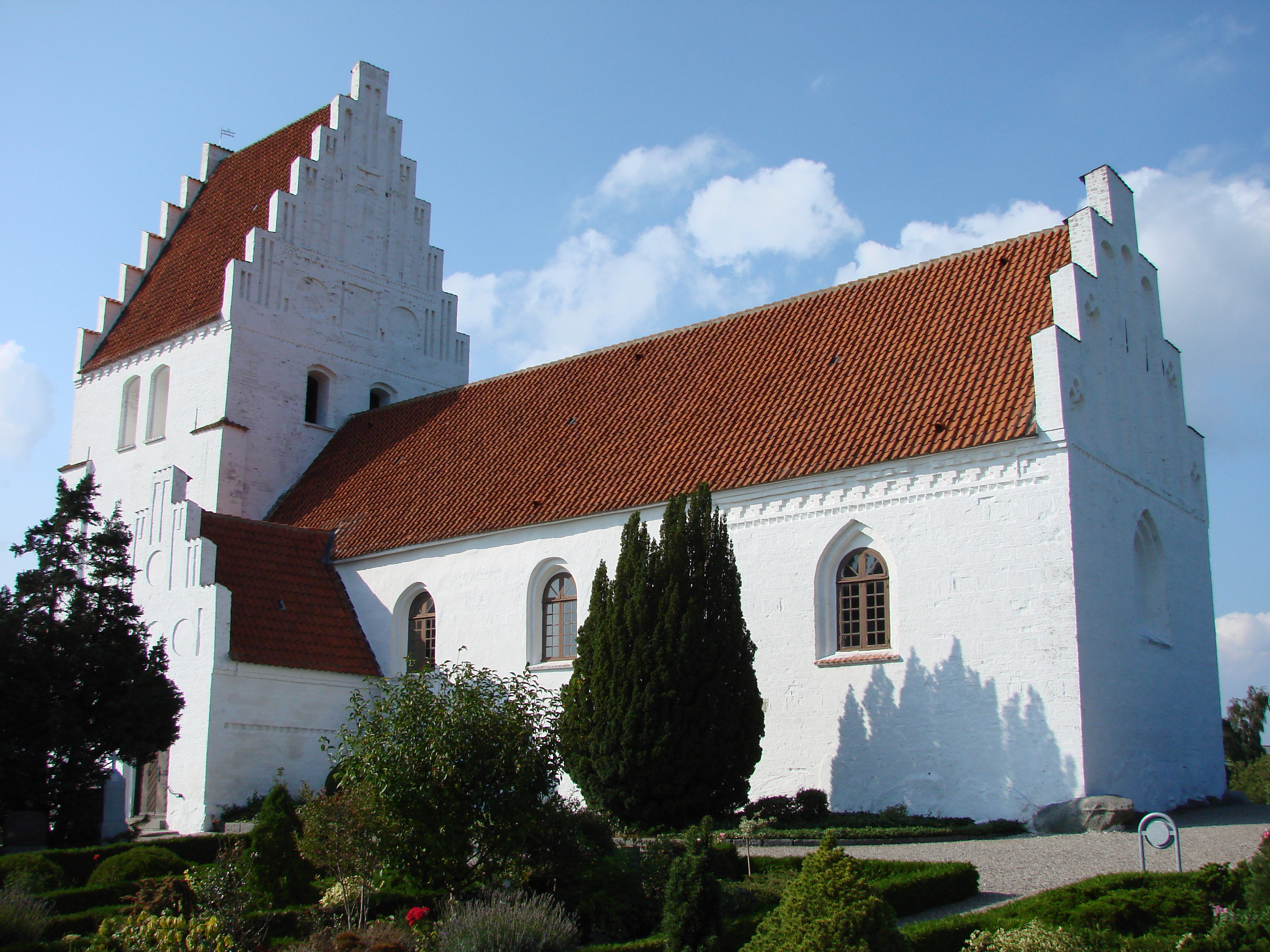 2008 09-07 09-08 Dänemark 276 Moen, Elmelunde